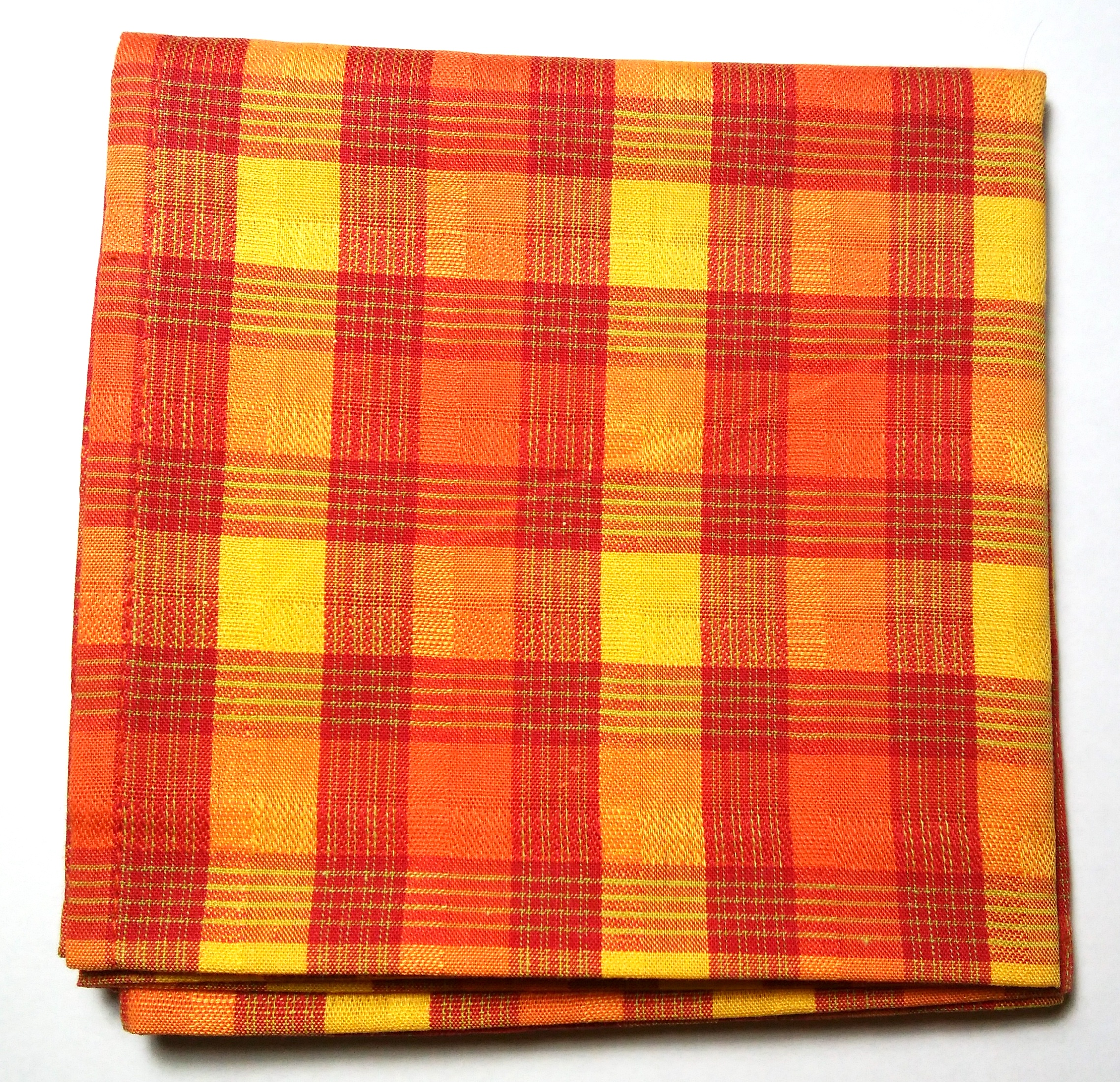 播州織で作られたハンカチ